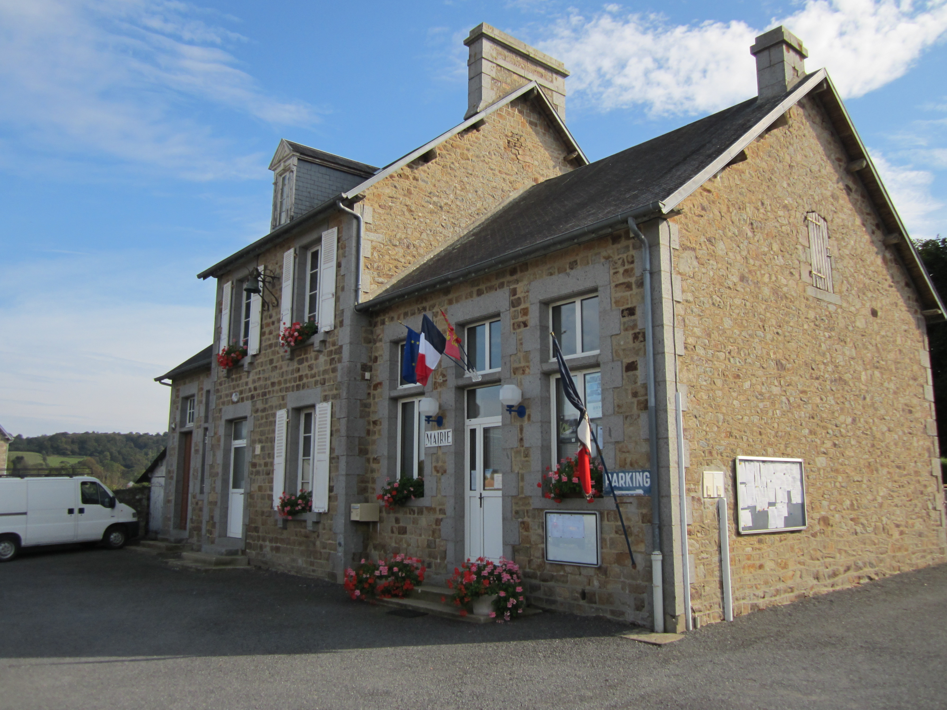 Les Chéris, Manche